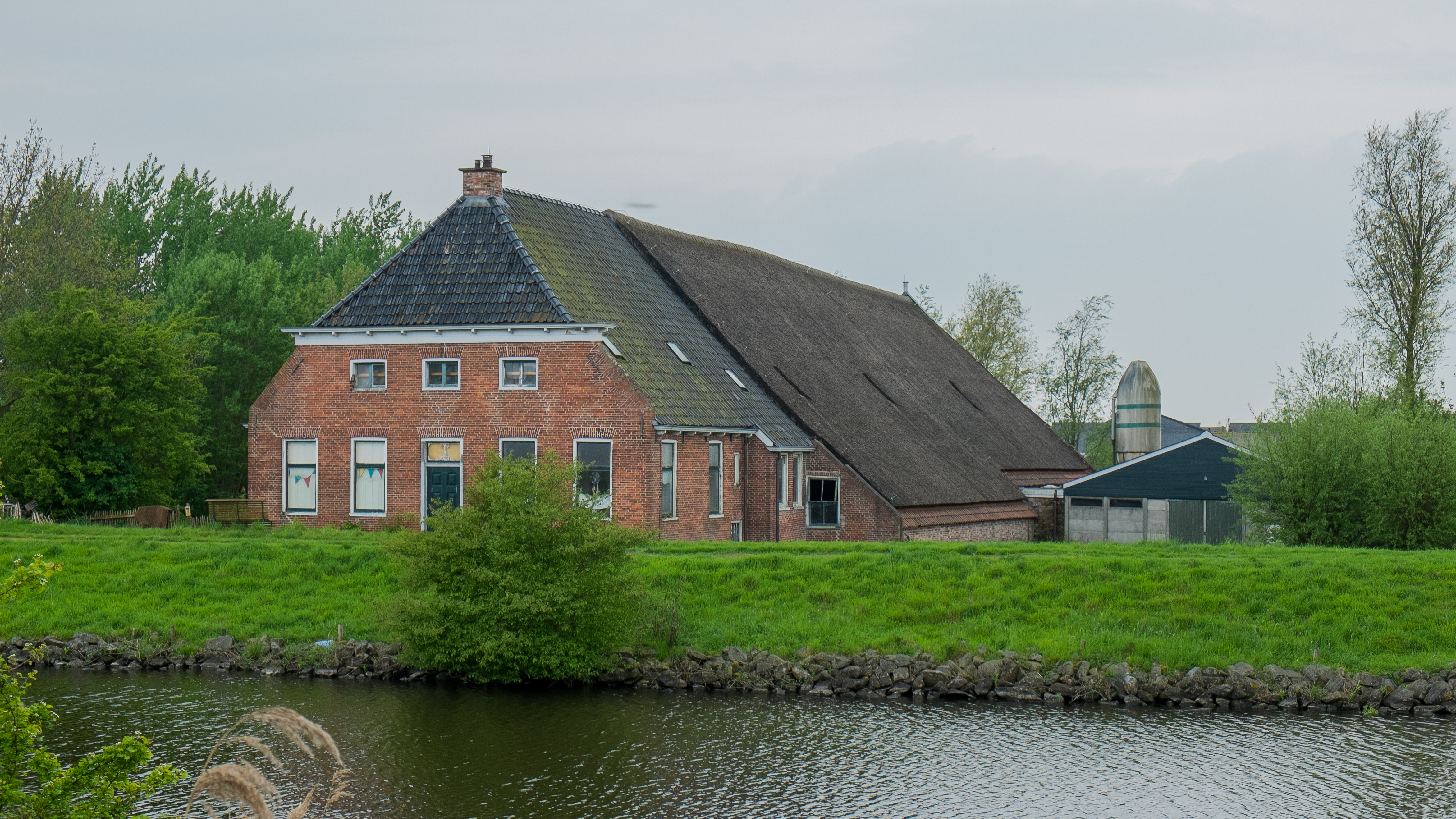 Boerderij Hoogeweg 13